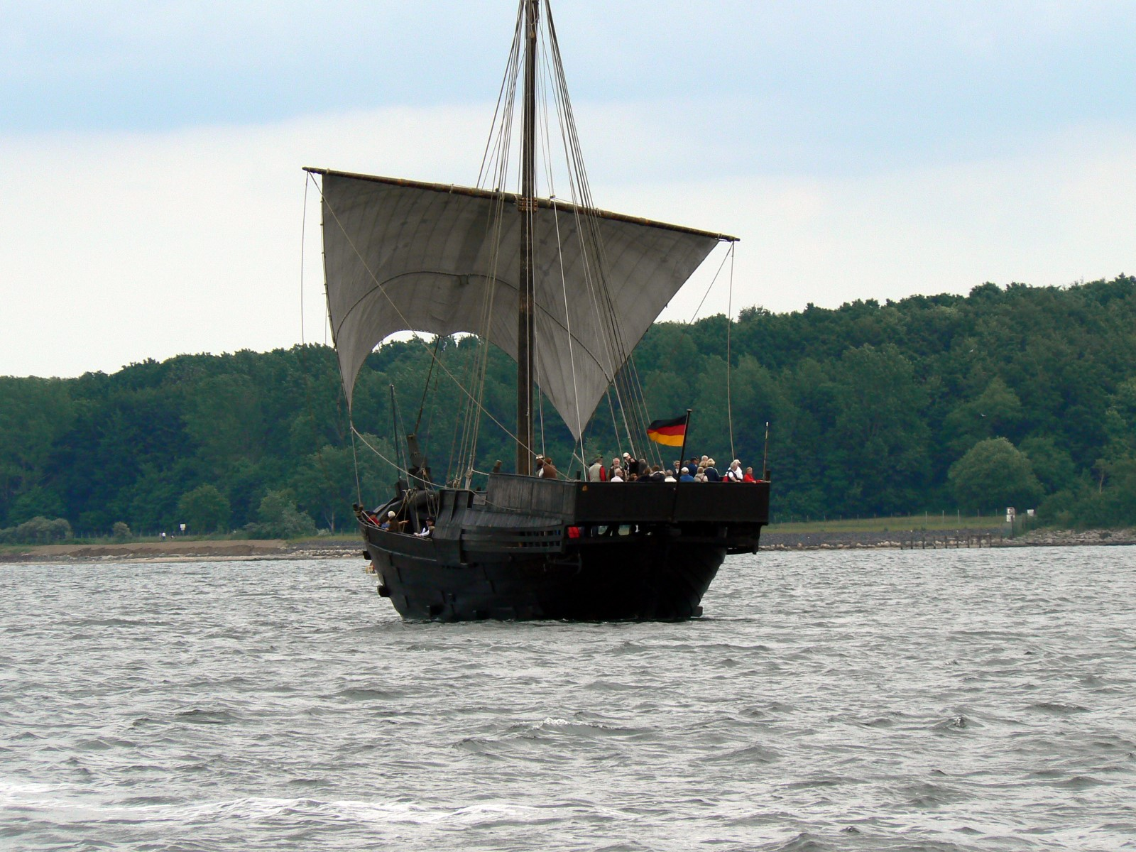 Segelschiff (Kogge) Kieler Hansekogge auf der Kieler Woche 2007. Nachbau der bei Bremen 1962 aufgefundenen Bremer Kogge von 1380. Fertigstellung des Nachbaus: 1991 (Heckansicht).